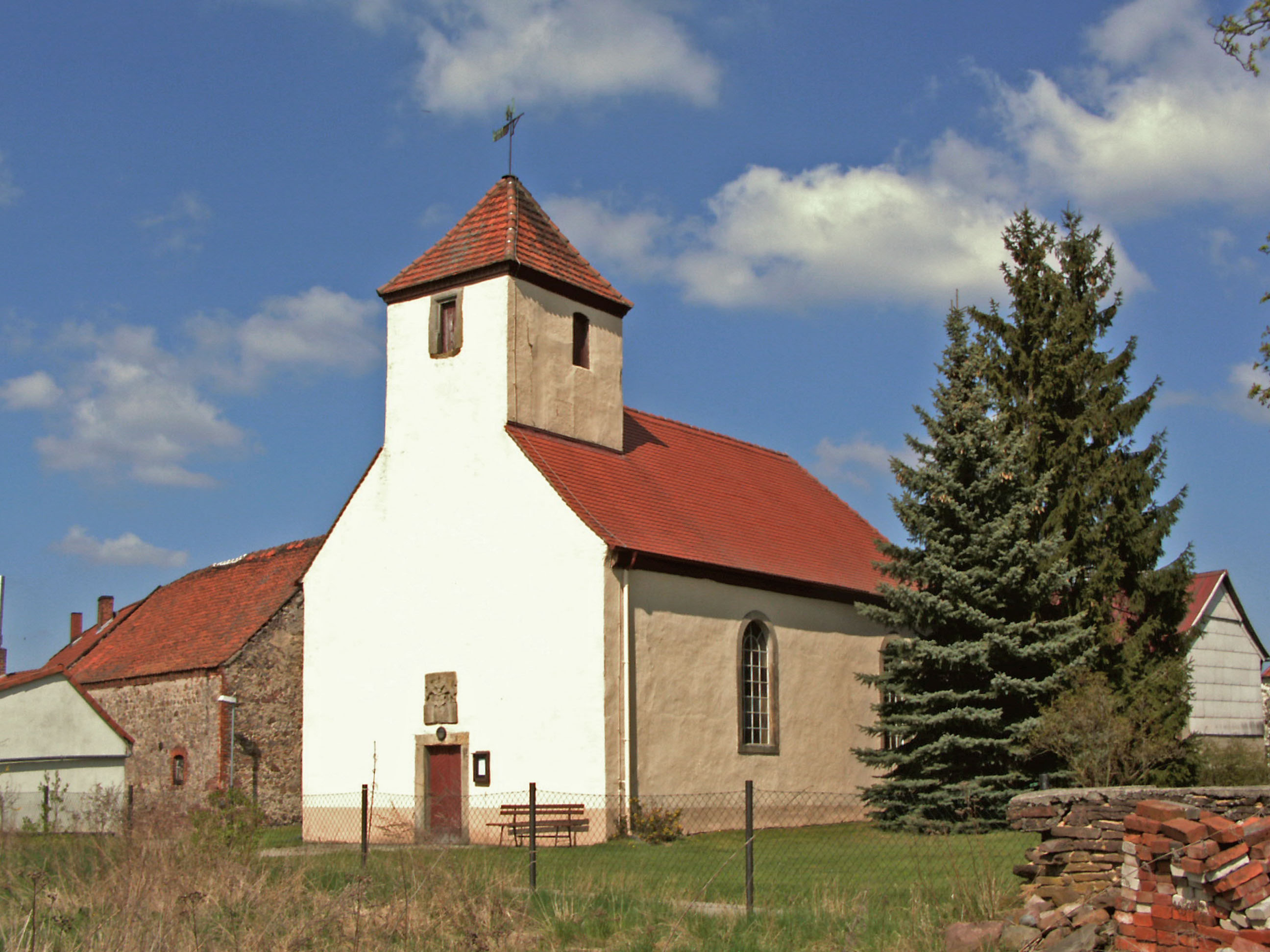 Evangelisch-lutherische Kirche in Everingen (Sachsen-Anhalt)